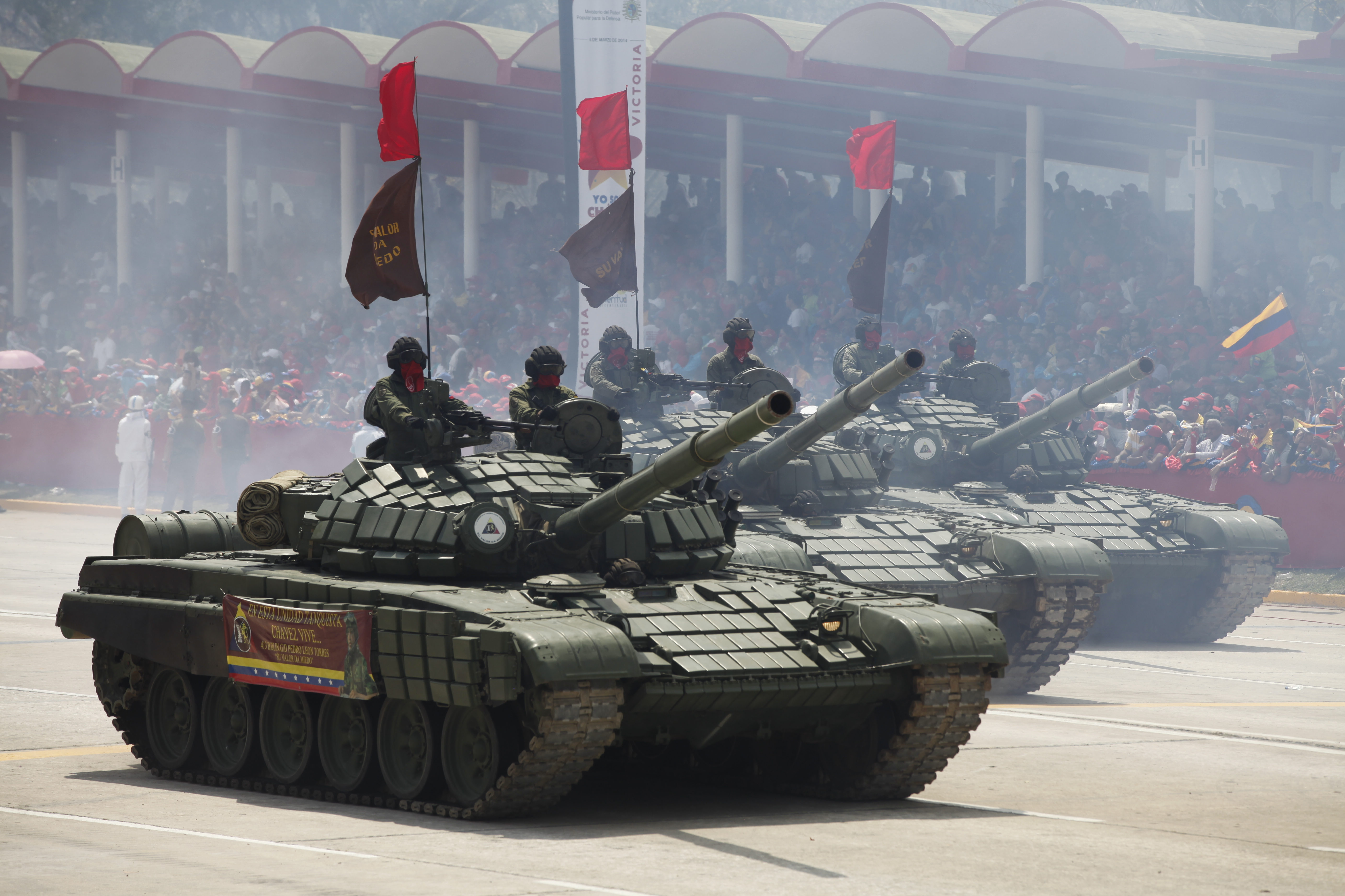 Caracas (Venezuela), 05 de Marzo del 2014. El Canciller del Ecuador, Ricardo Patiño, participó en los actos de conmemoración de la muerte del Comandante Hugo Chávez Frías. Foto: Xavier Granja Cedeño / Cancilleria Ecuador